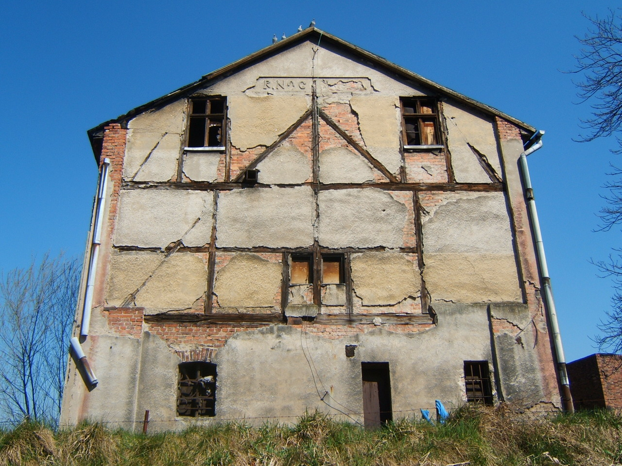 Młyn nad Kłodnicą w Halembie